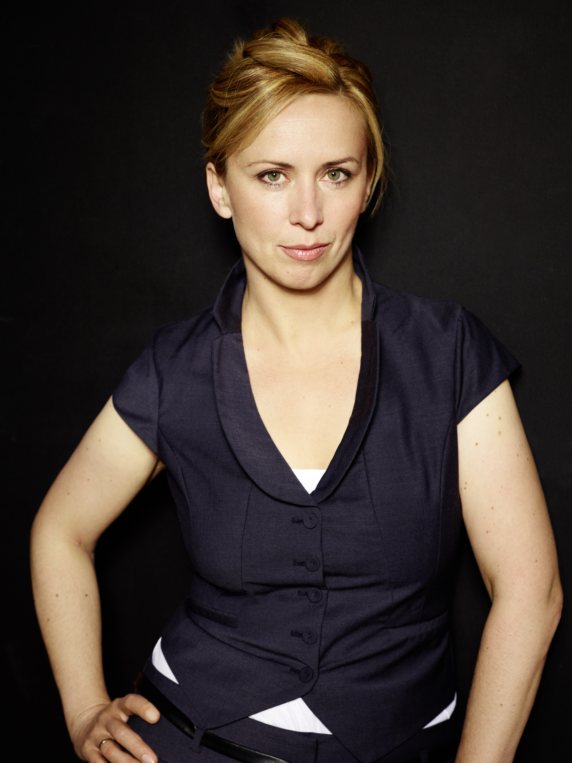 Pressefoto von Martina Brandl